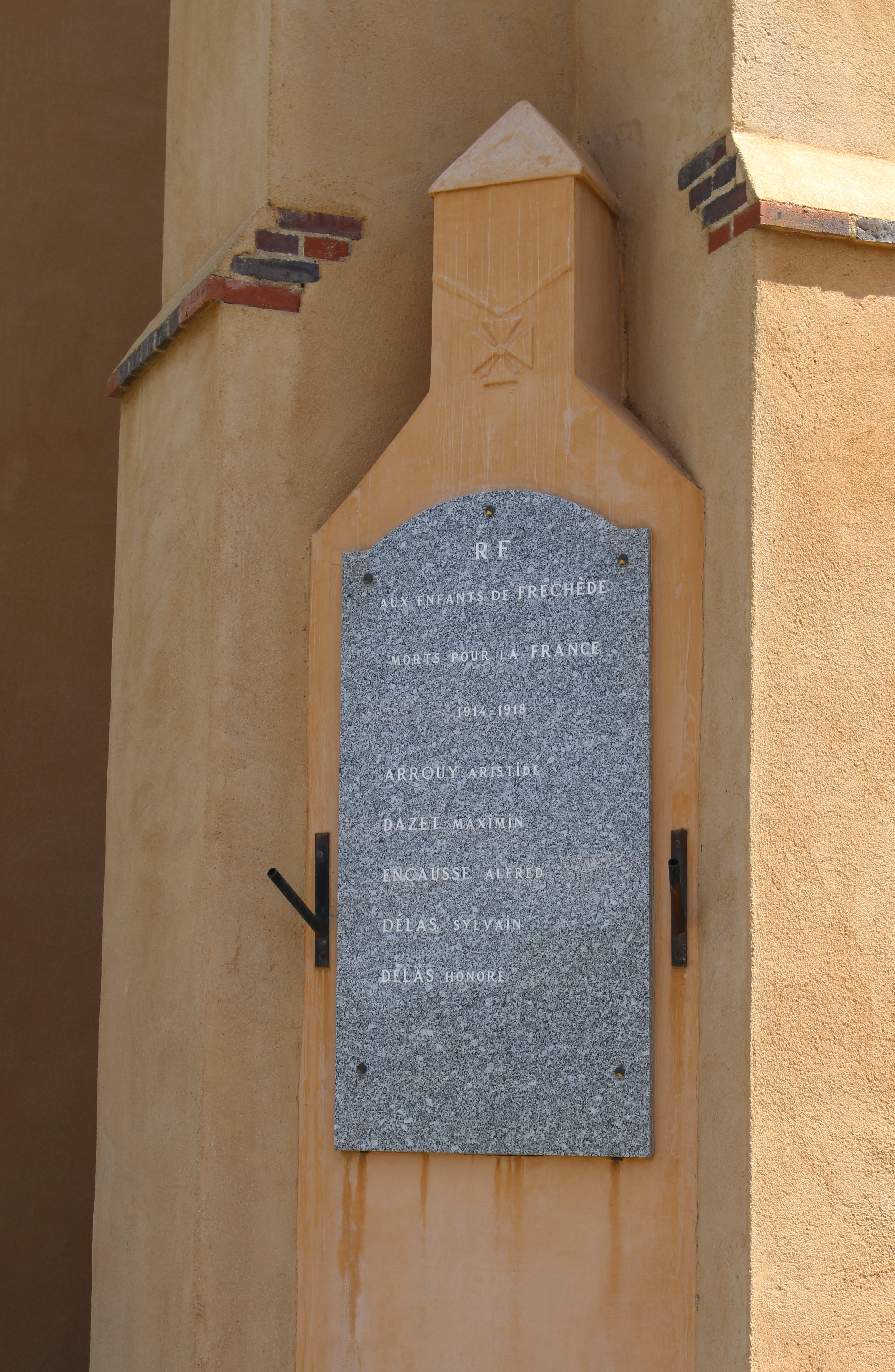 Monument aux morts de Fréchède (Hautes-Pyrénées)